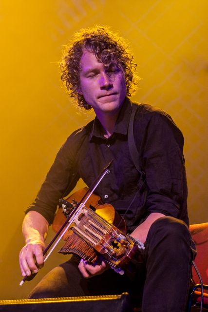 Erik Rydvall